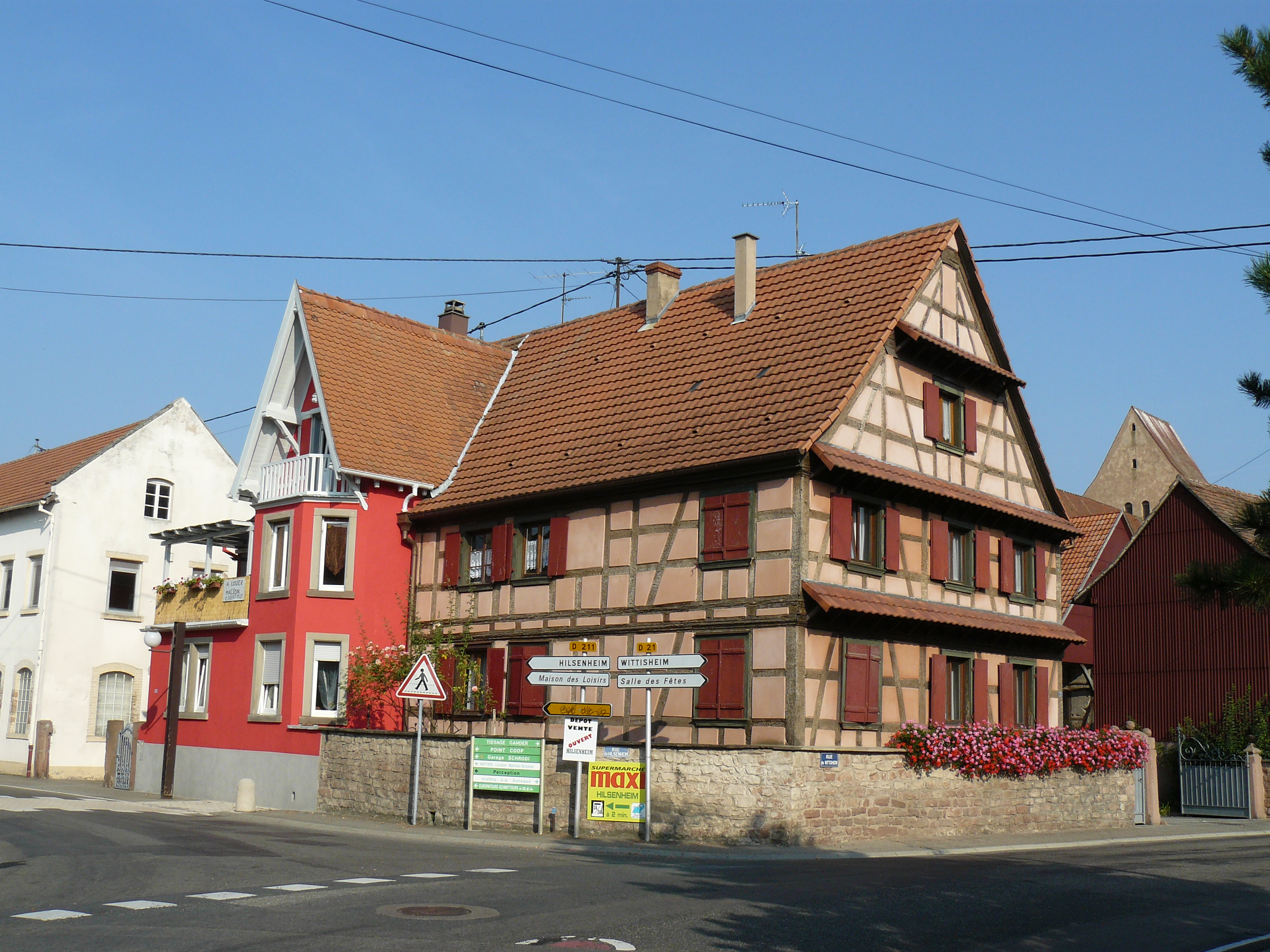 Maison à colombages